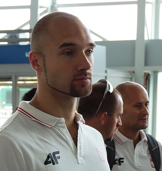 Łukasz Grzeszczuk - polski oszczepnik przed wylotem na Mistrzostwa Świata 2013